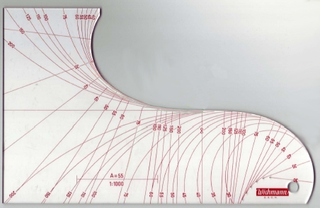 Klothoidenlineal